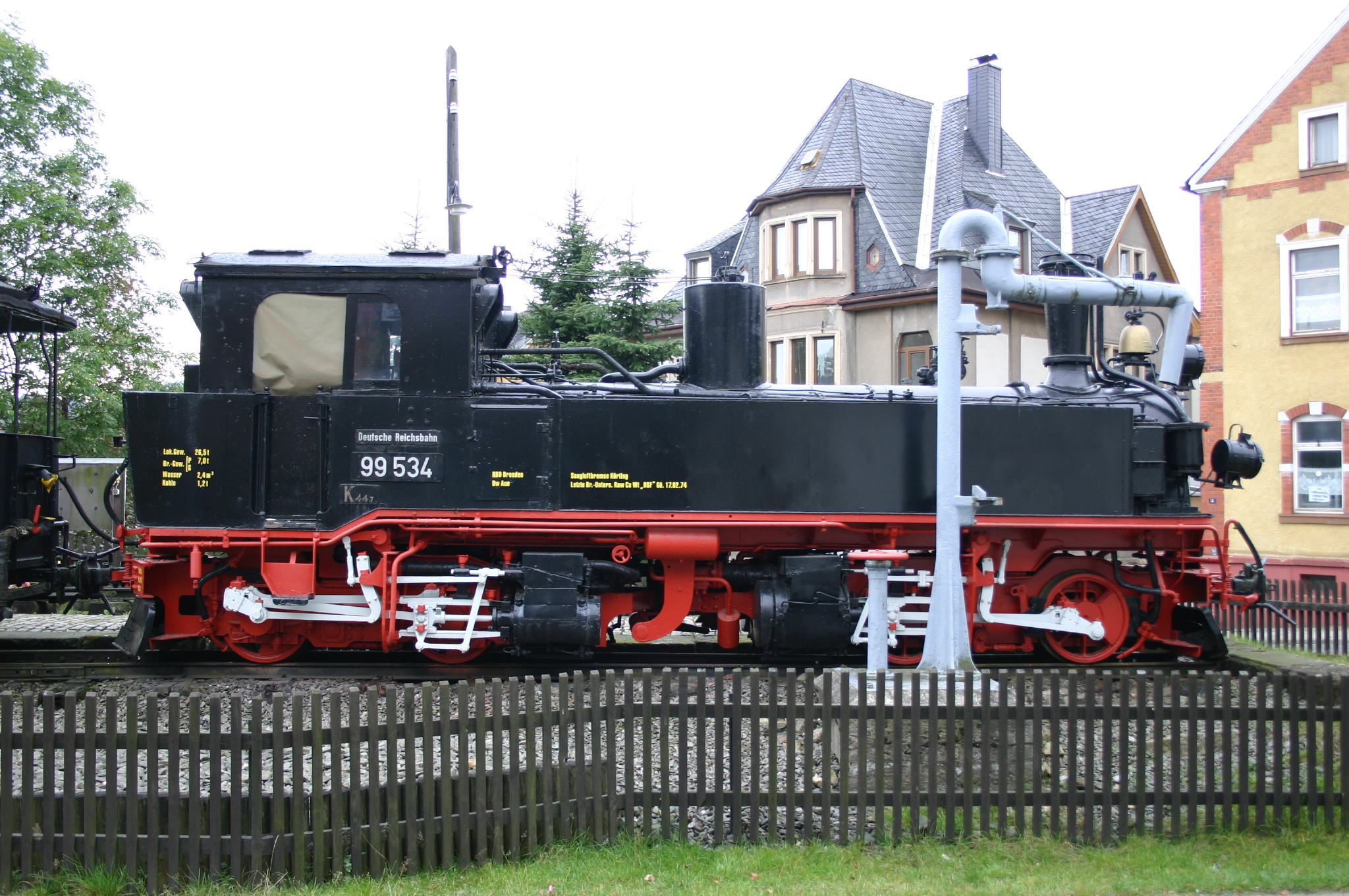 Schmalspurdampflok 99 534 als technisches Denkmal in Geyer 28.09.05